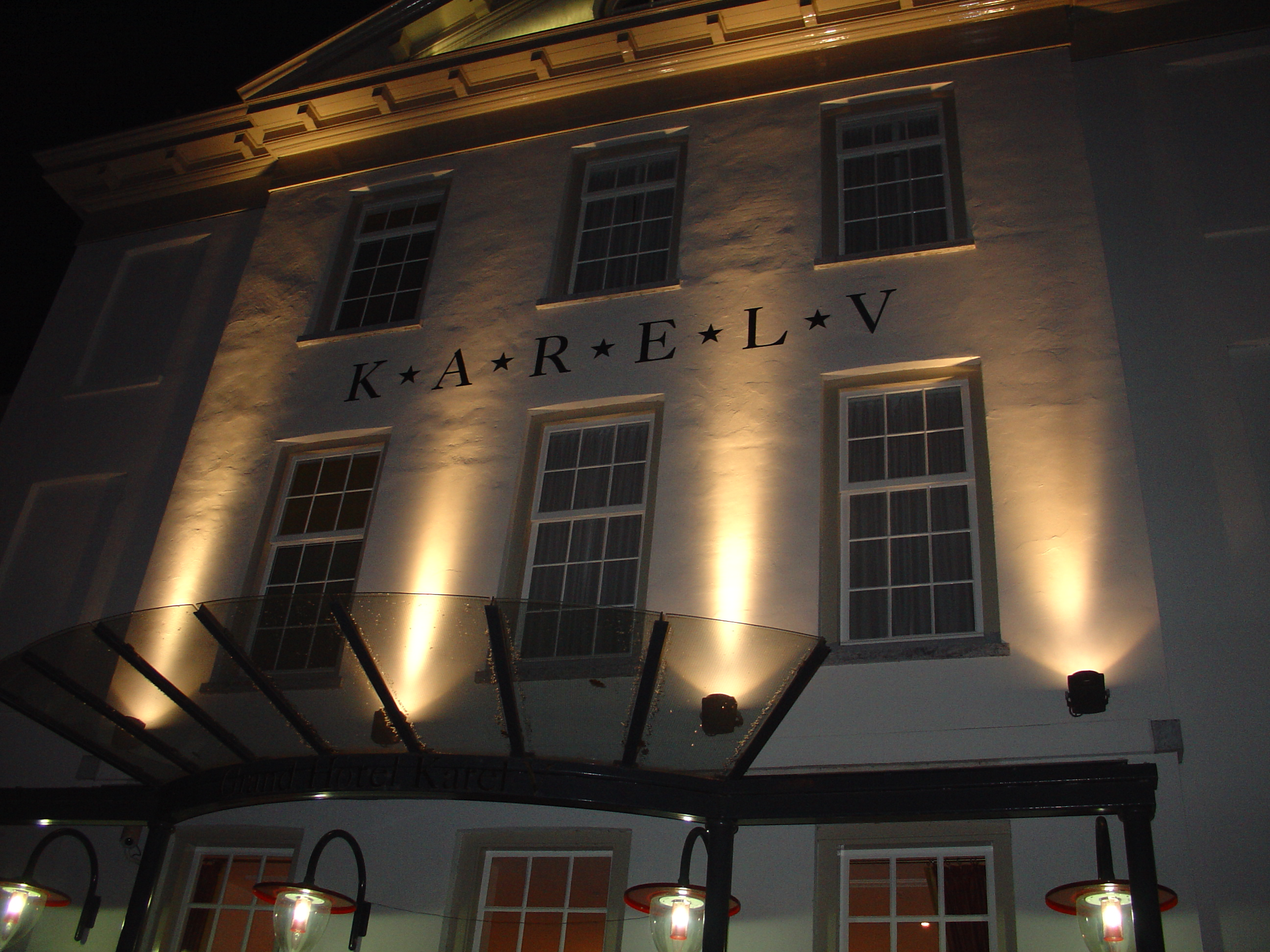 Description Duitse huis in Utrecht Date28 December 2005SourceOwn workAuthorPeter Huyghe Duitse huis in Utrecht